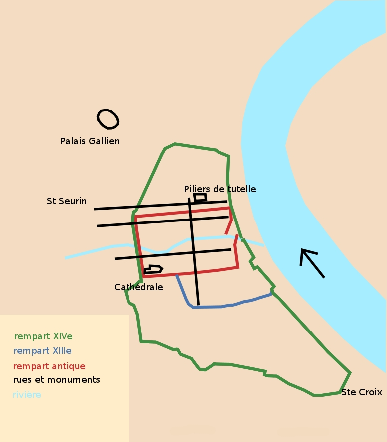 le développement de Bordeaux, antiquité et moyen-âge.